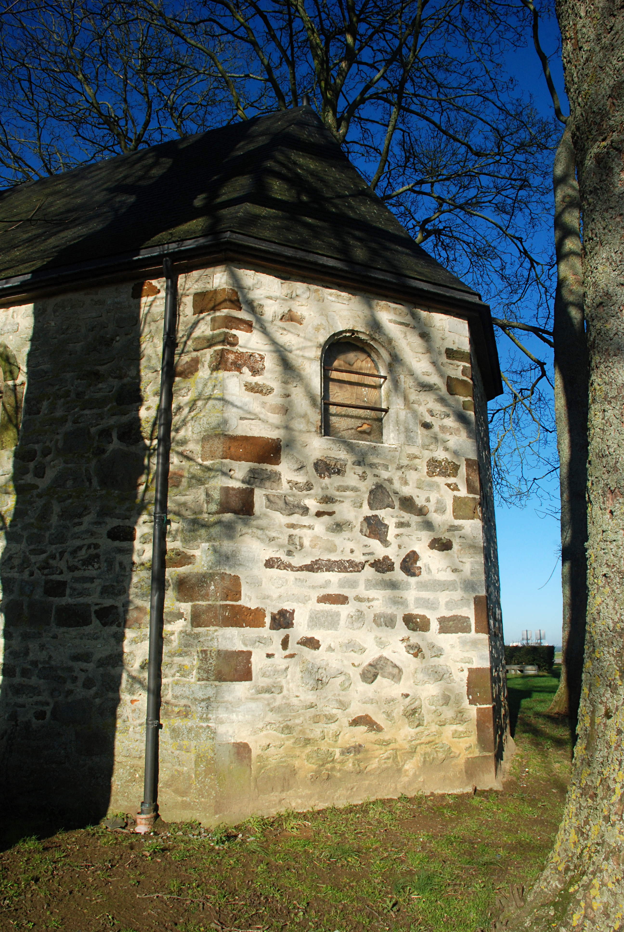 Belgique - Brabant wallon - Chaumont-Gistoux - Longueville - Chapelle du Chêneau